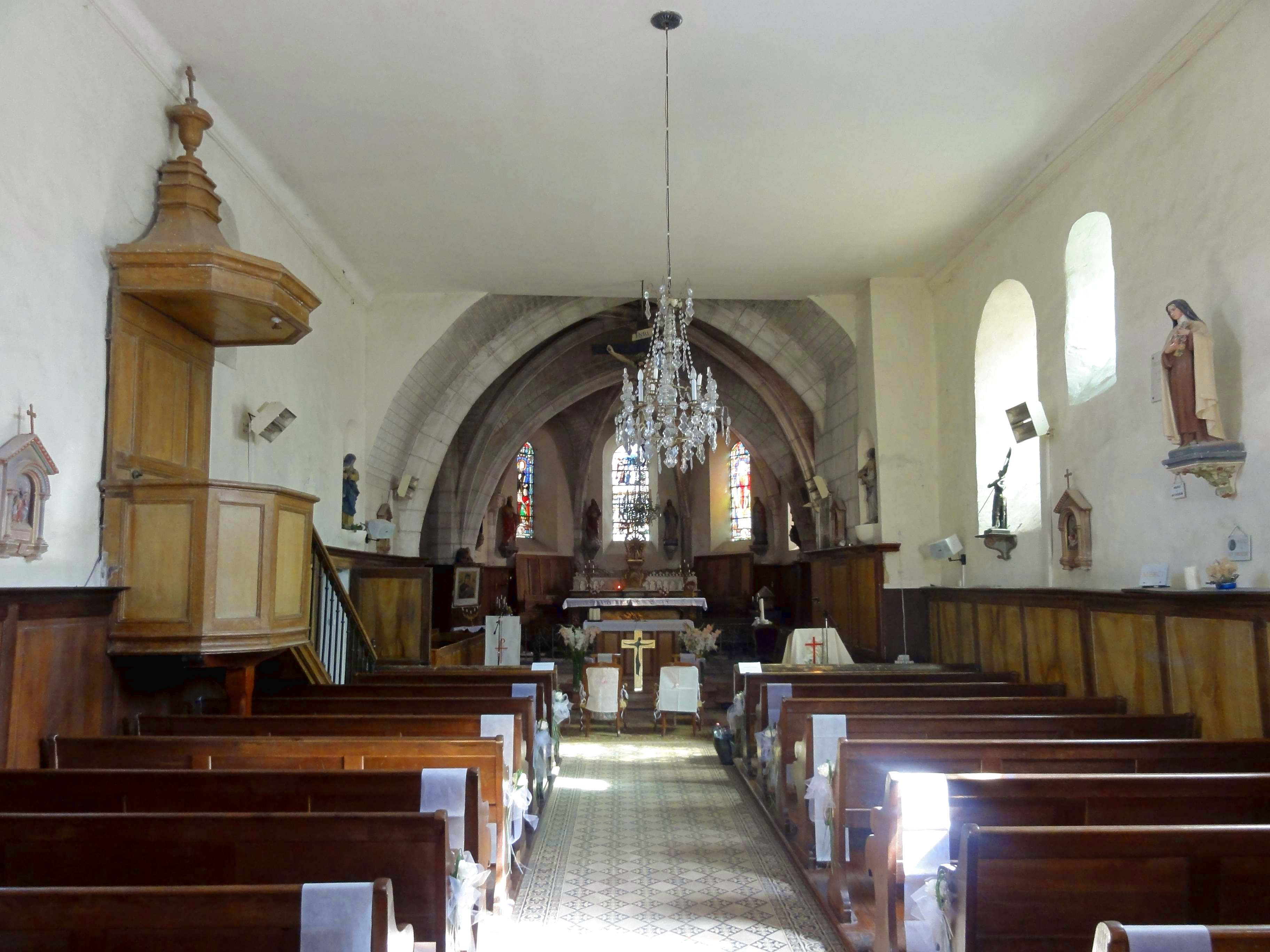 Intérieur de l'église - voir titre.